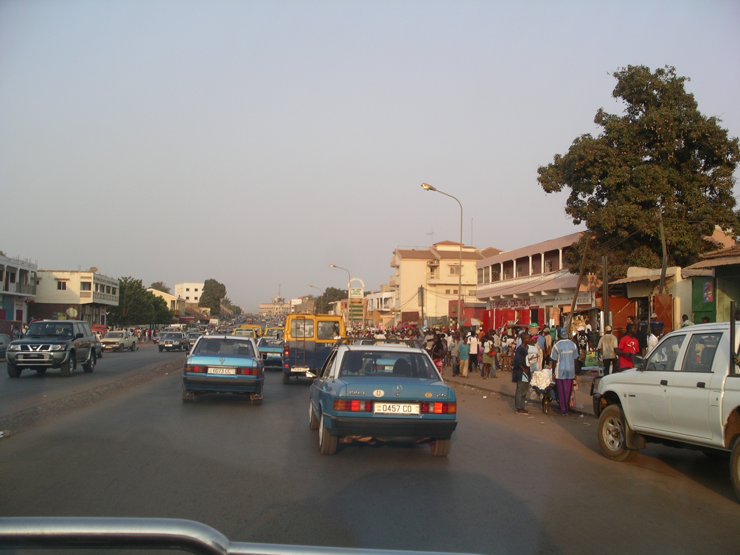 Cena urbana da capital da Guiné-Bissau.